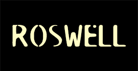 My own Photoshop creation to support the danish Roswell article